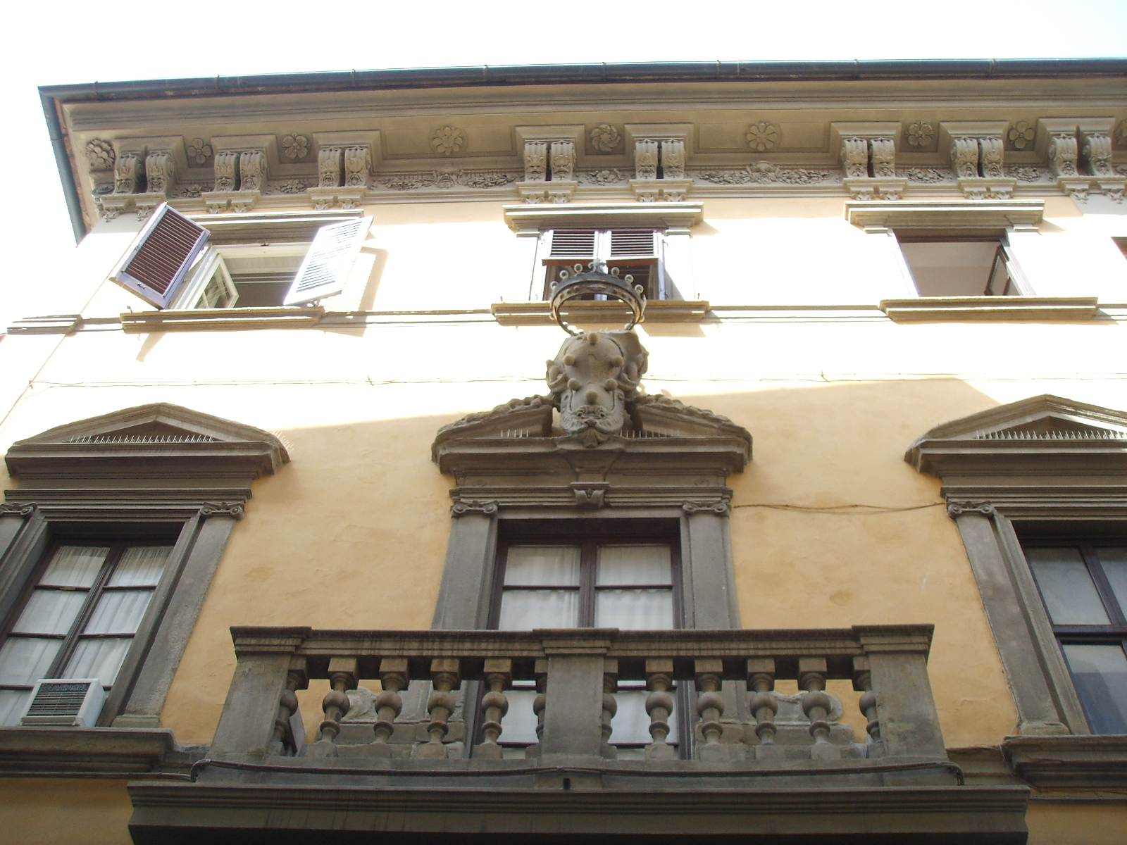 Via santo spirito, palazzo